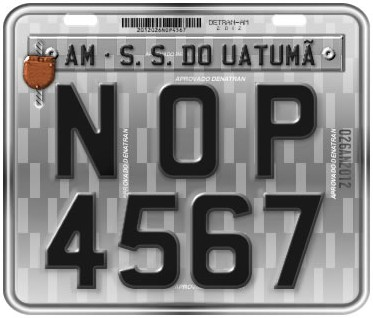 Placa veicular de passeio para motocicletas, nas dimensões e especificações atualizadas pela Resolução 372/2011 do Contran, na escala 1 cm = 37,8 px.